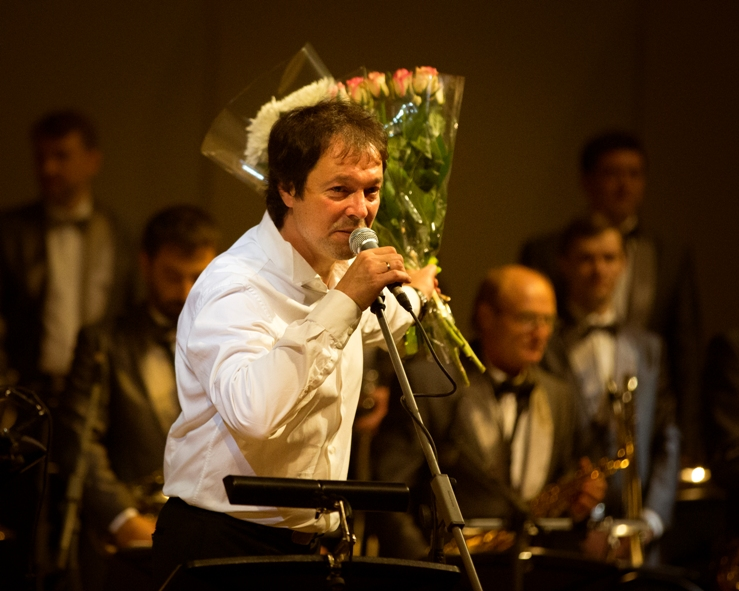 юбилей